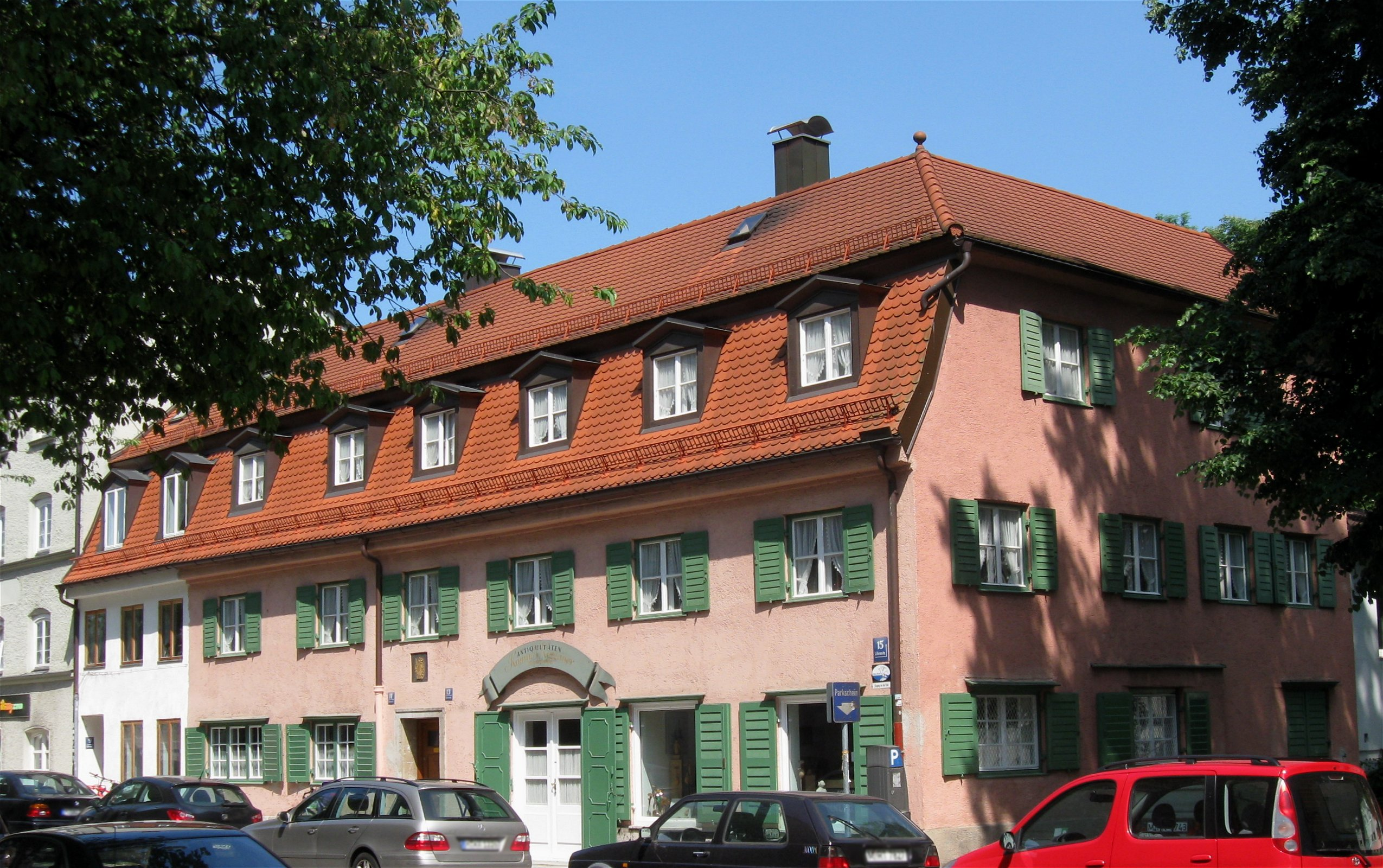 Lilienstraße 9/11/13/15; Niedrige, langgestreckte Baugruppe der 2. Hälfte des 18. Jh.; Nr. 11/13 über der Tür Gusseisen-Madonnenrelief, bez. 1764.